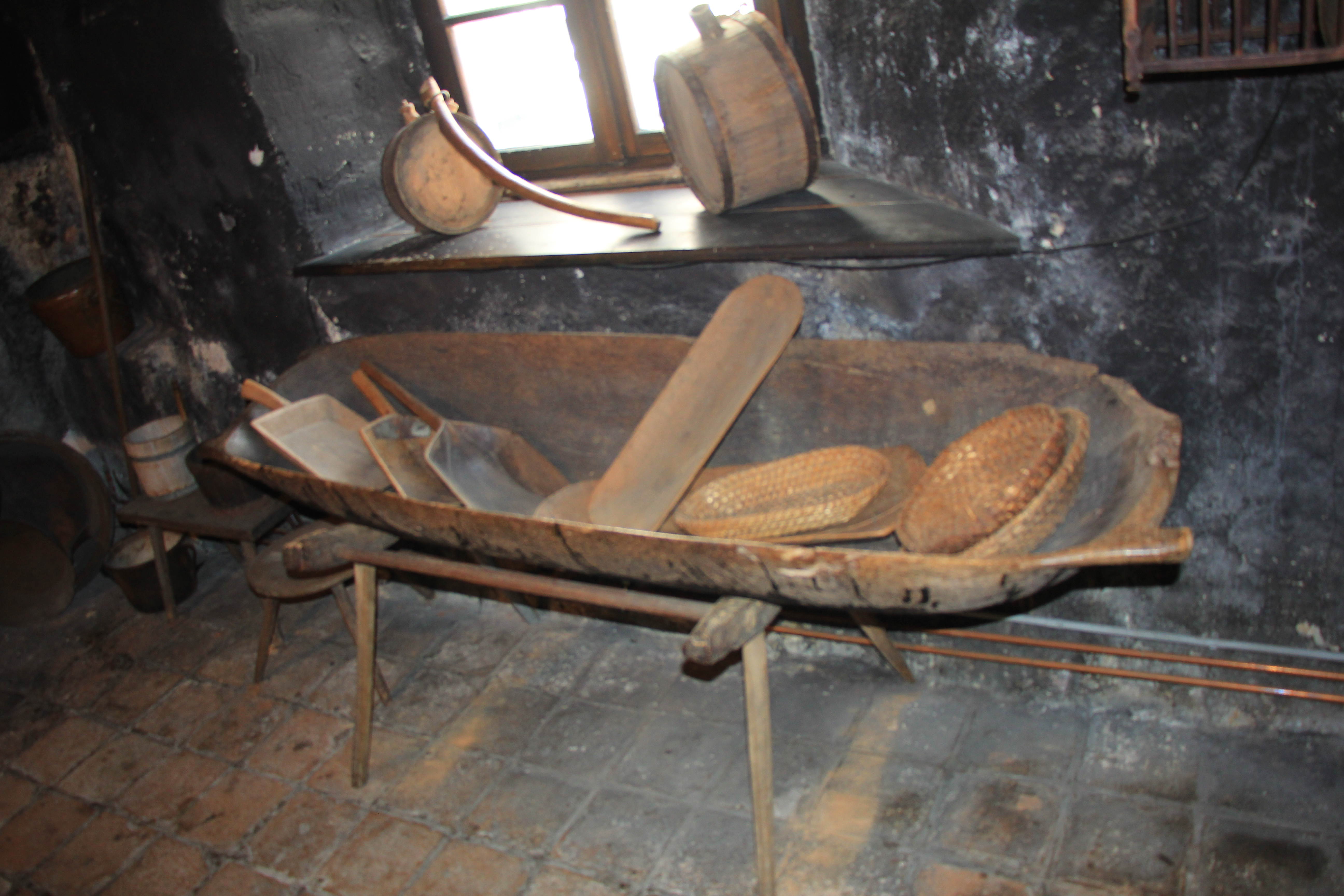 Ausstellungstück im Hammerherrenmuseum Lunz am See